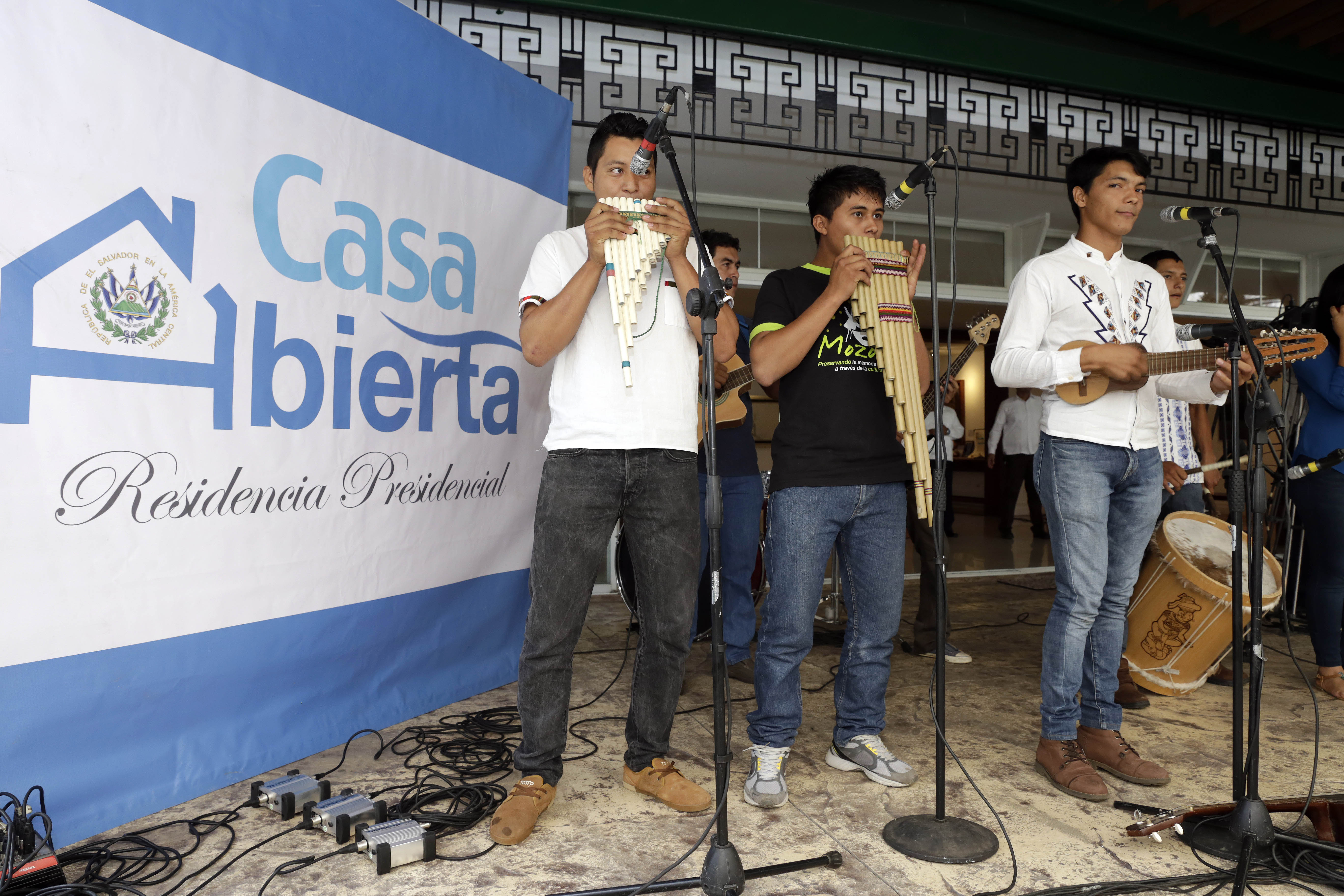 Casa Abierta Casas de la Cultura 03